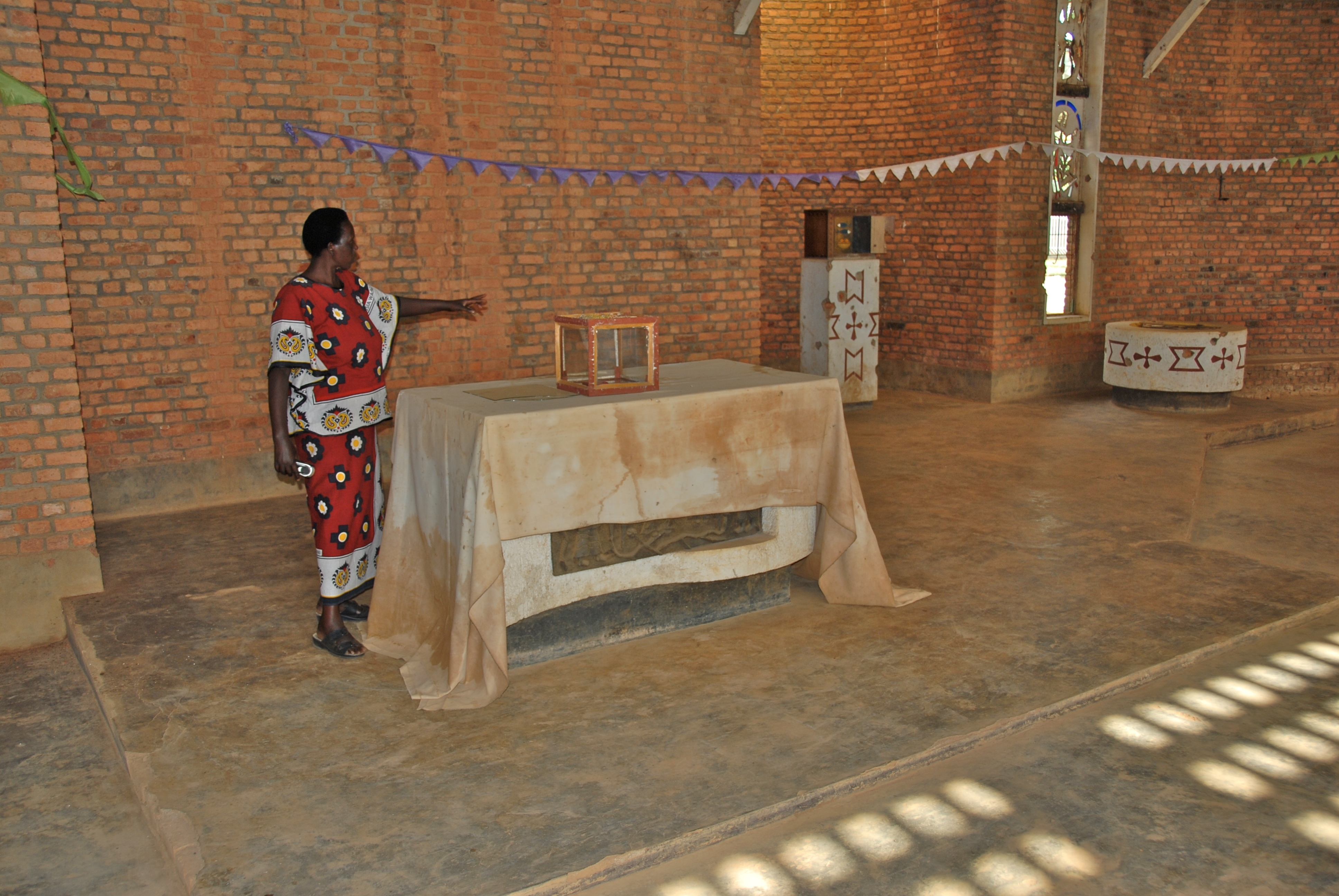 Nyamata Genocide Memorial Church